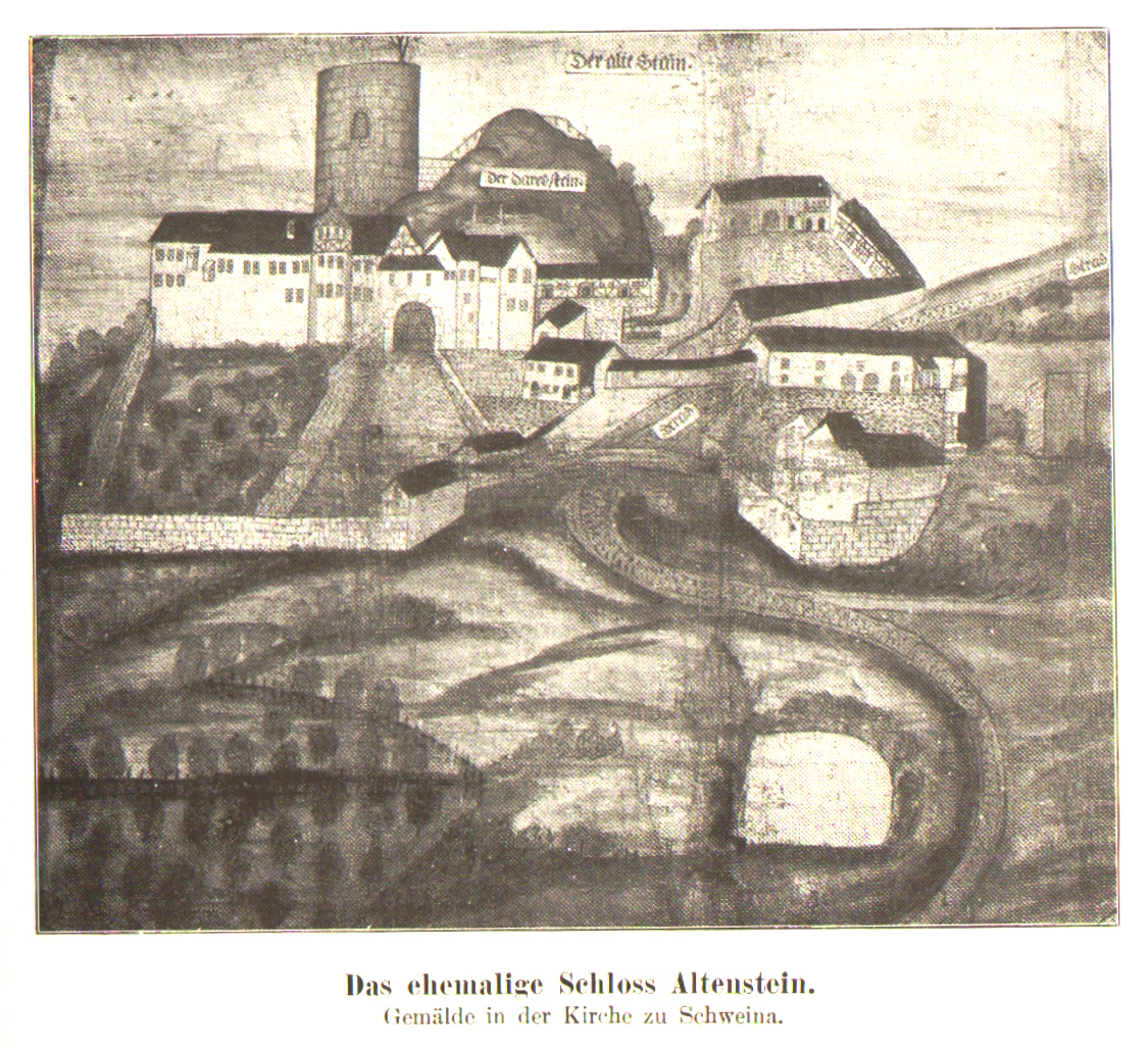 Kopie einer Ansicht von Schloss Altenstein auf einem Gemälde in der Dorfkirche von Schweina.